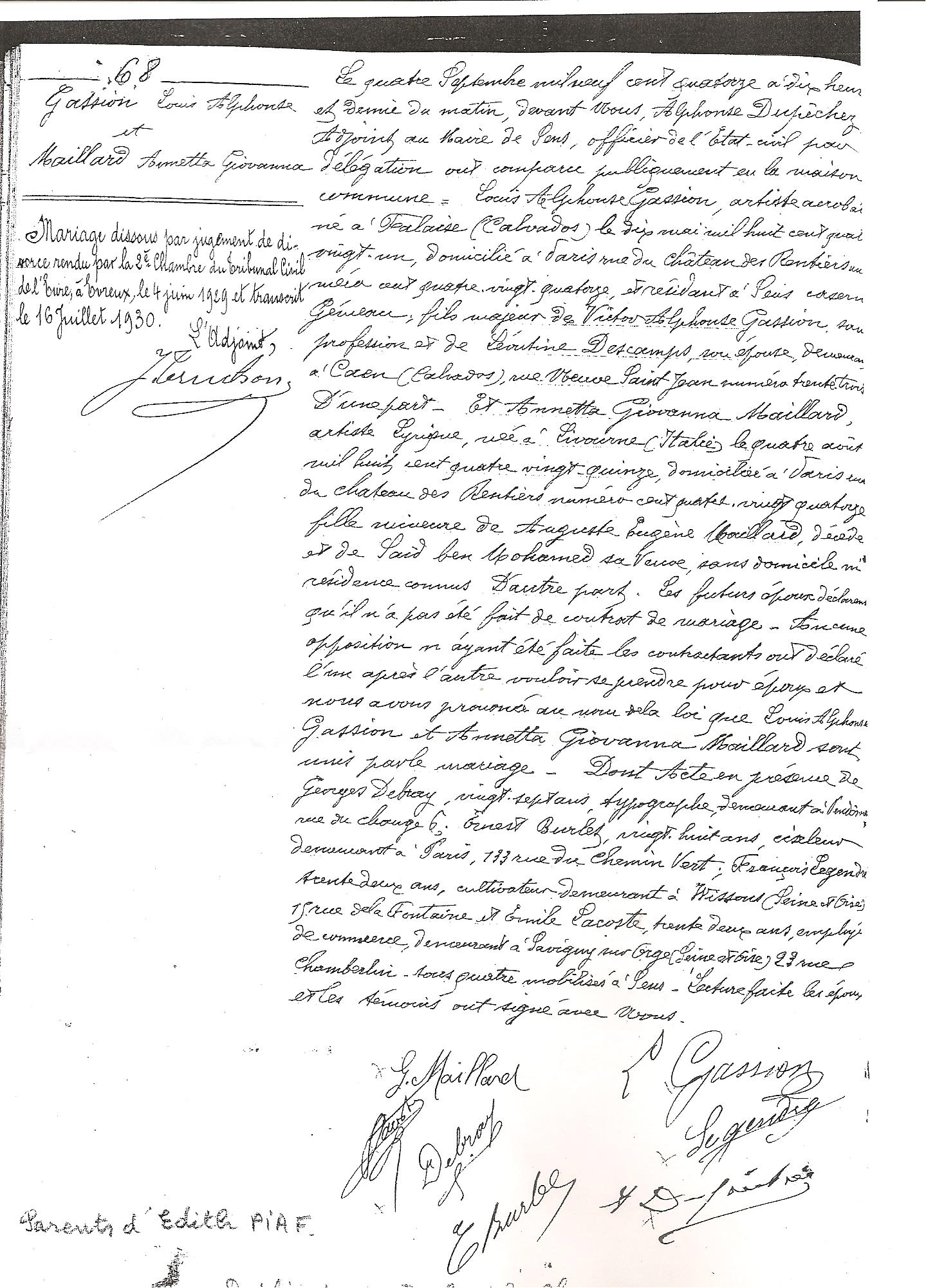 Extrait de l'acte de mariage des parents d'Édith Piaf.